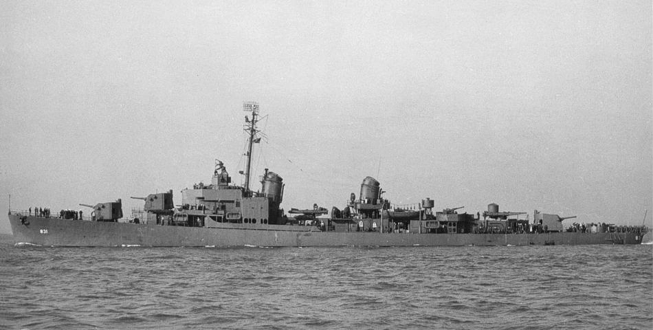 The U.S. Navy destroyer USS Goodrich (DD-831) underway in 1945.